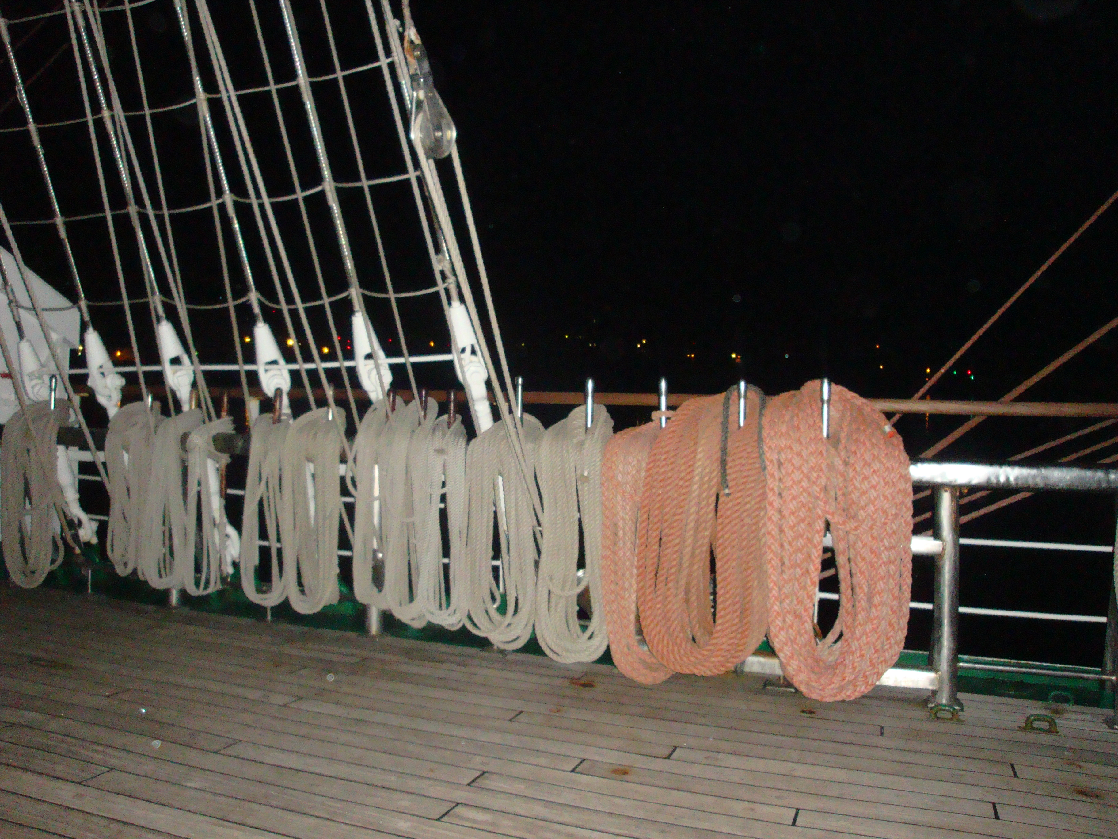 Dar młodzieży.Nagielbank, obłożone gejtawy i gordingi grota.